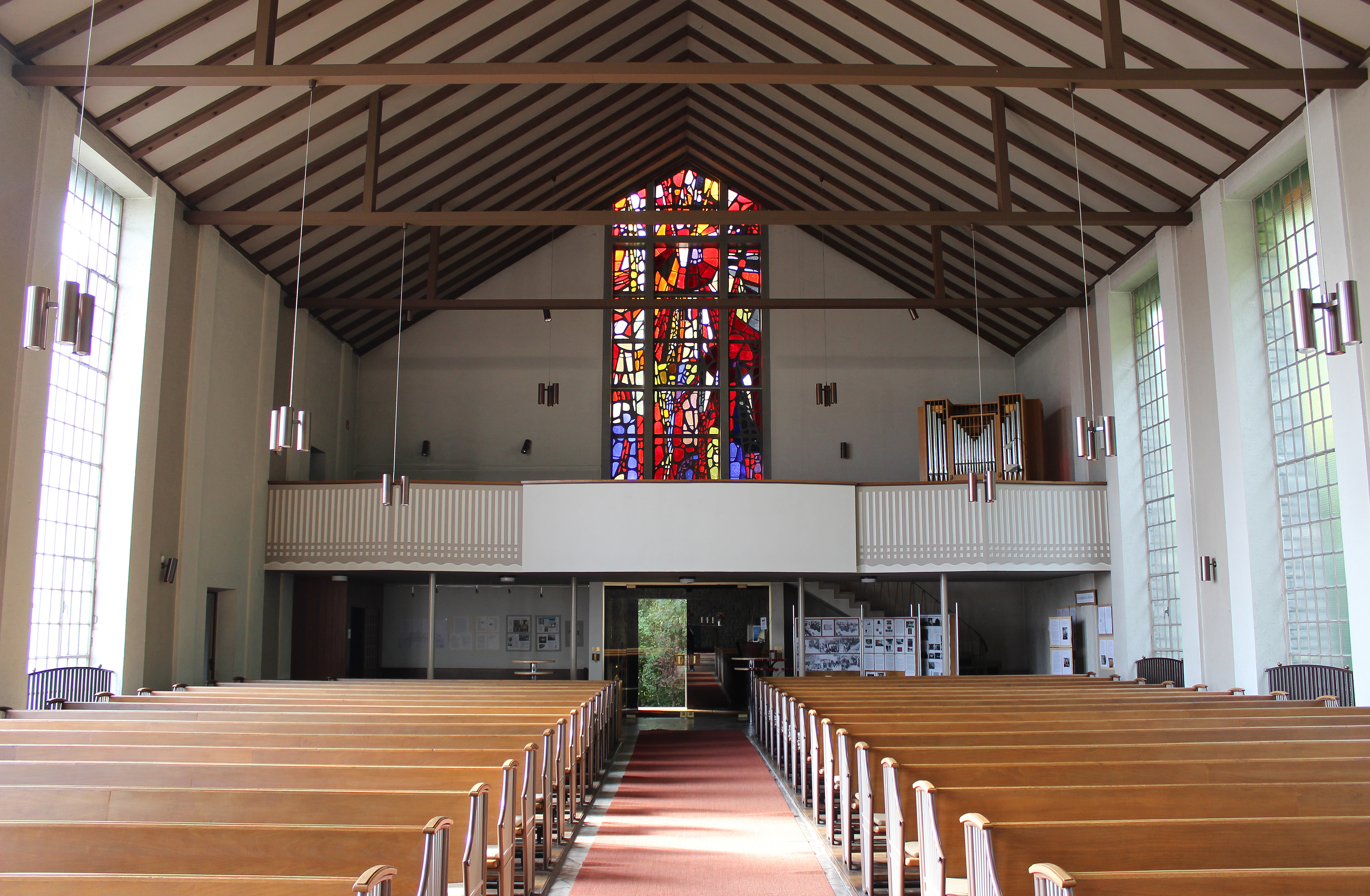 Blick ins Innere der evangelischen Auferstehungskirche in Wehrden, einem Stadtteil von Völklingen, Saarland